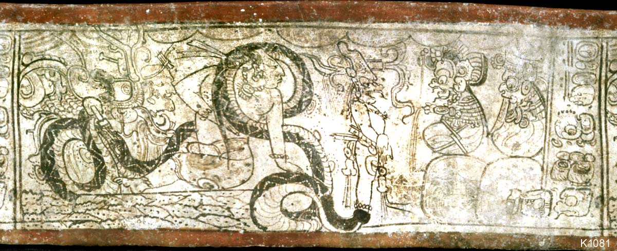 Jarron maya con la imagen de Ixquic con K'awiil y los Señores de Xibalbá.